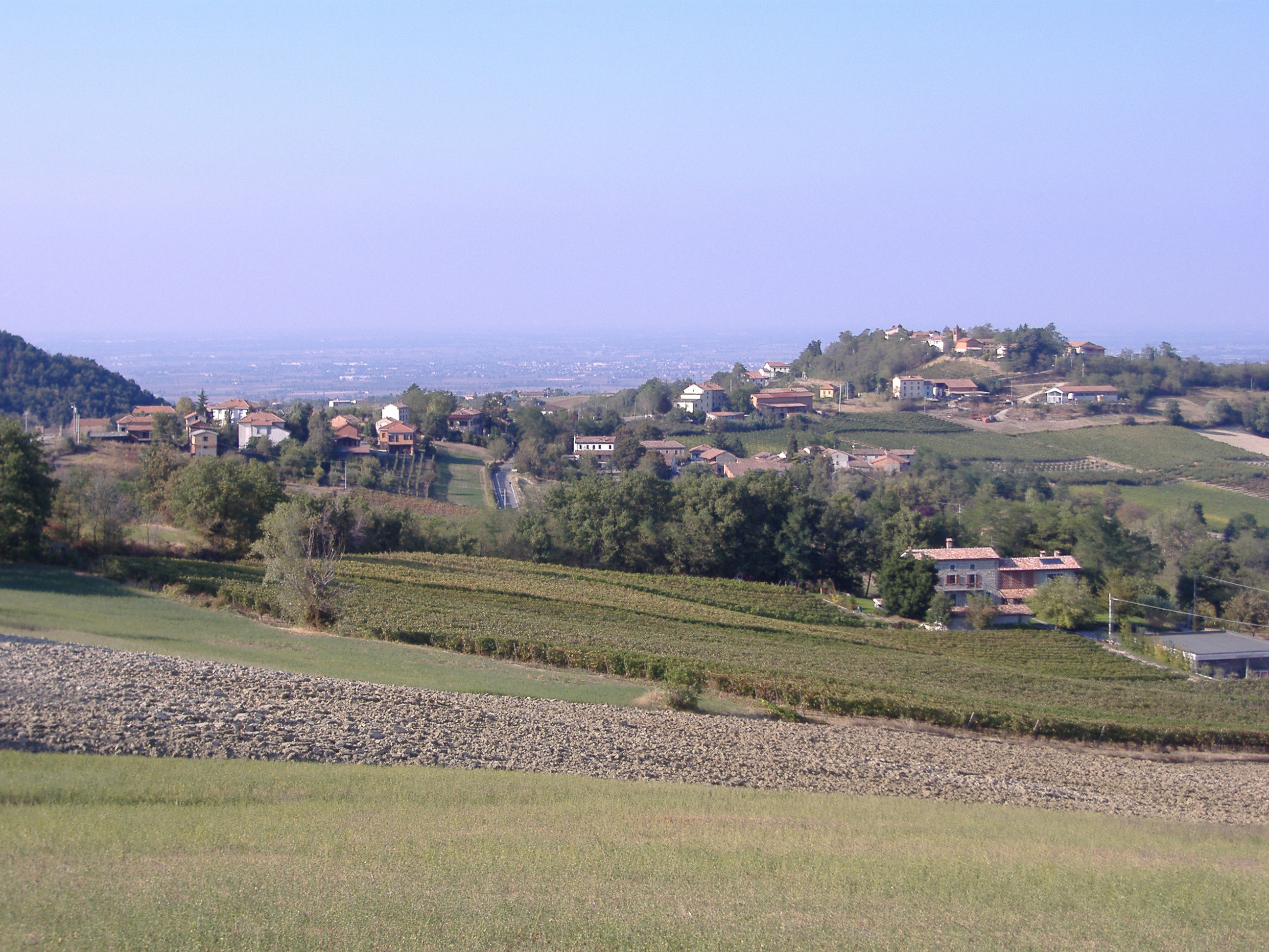 Panorama di San Lorenzo (sede municipio) e Monticelli (collina sulla destra), frazioni di Pozzol Groppo